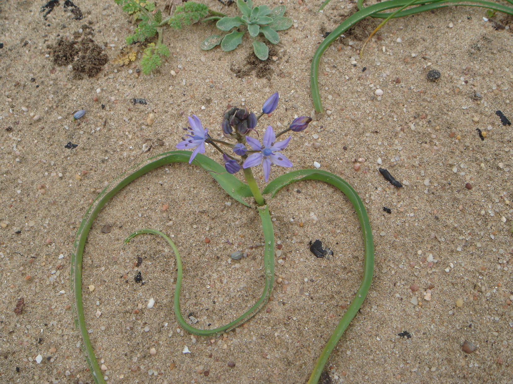 Scilla ramburei, Chiclana (Cádiz), España